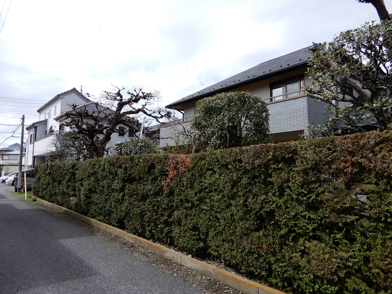 東町1丁目（元文化住宅地）